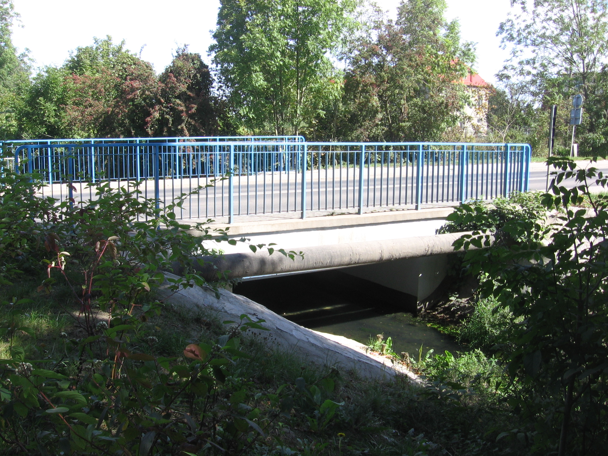 most drogowy nad Ługowiną we Wrocławiu przy ul. Żernickiej